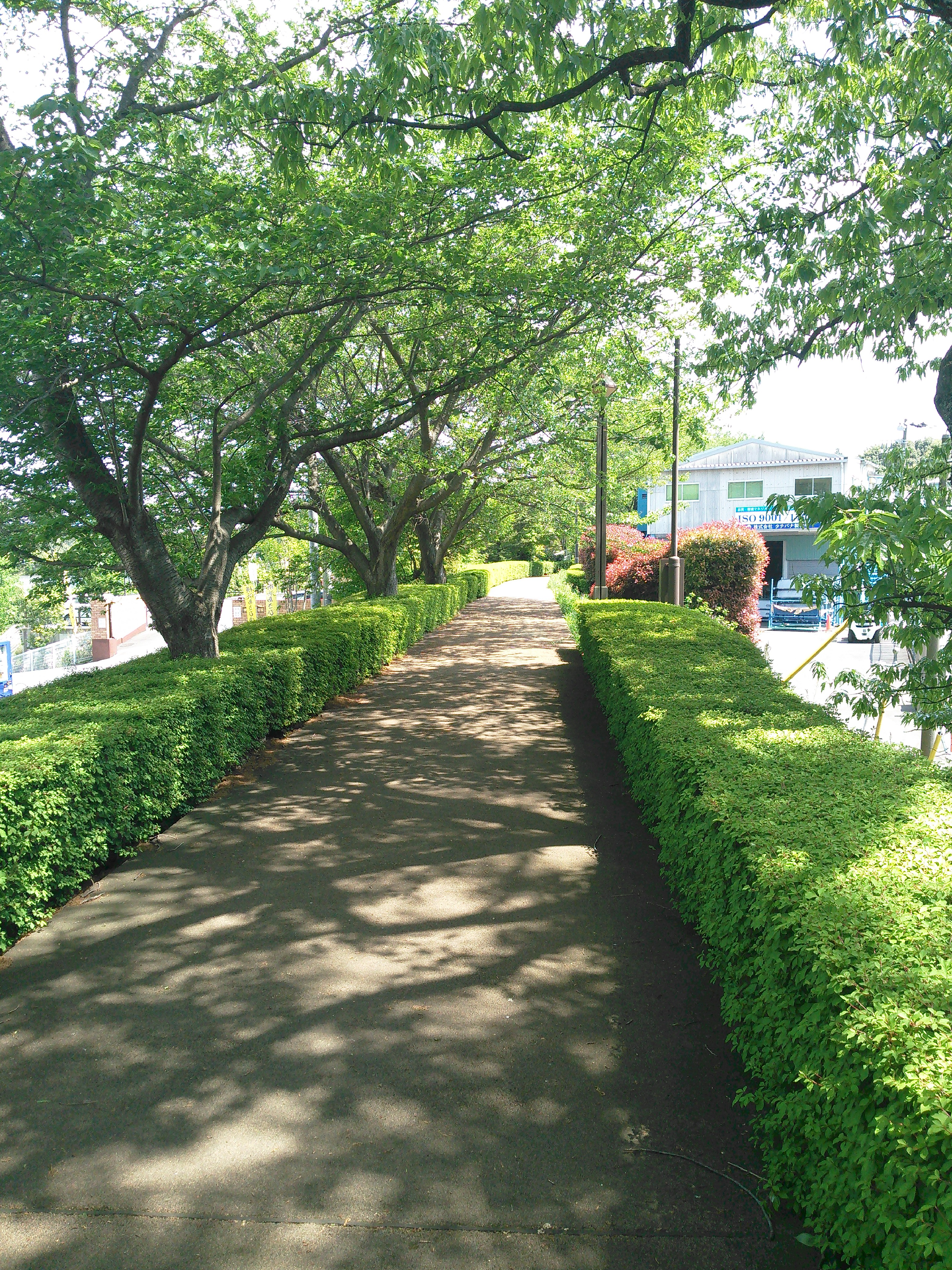 横浜市旭区、ふるさと尾根道緑道